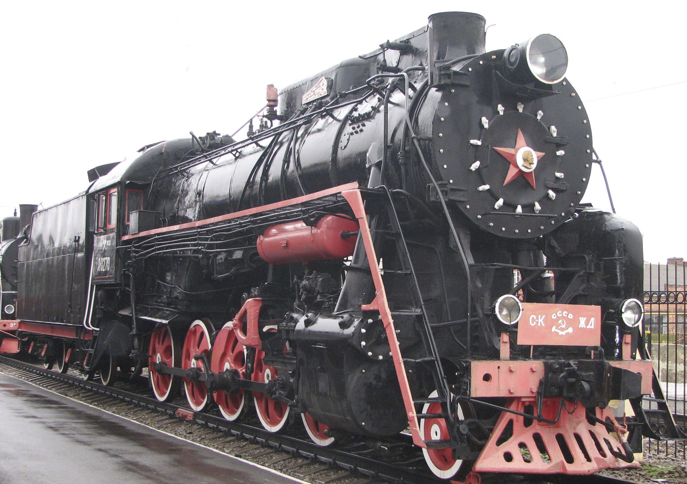 Паровоз построен в 1948 году Коломенским паровозостроительным заводом